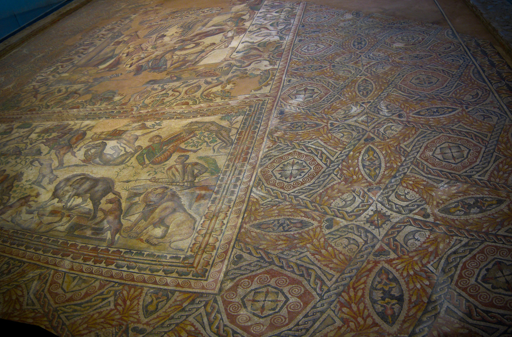 Uno de los mosaicos de la villa romana de La Olmeda.